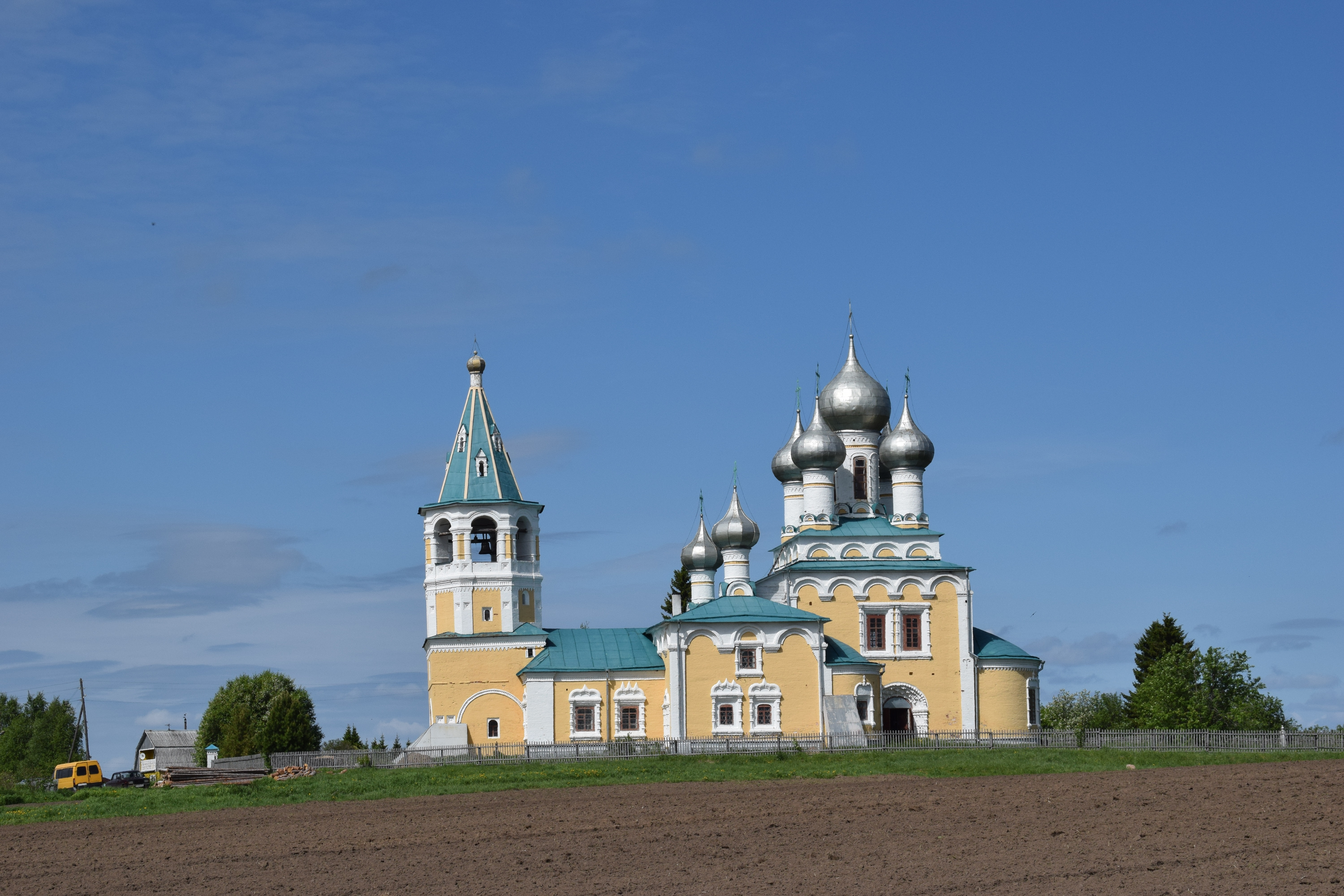 Церковь Воскресения Словущего: Верхние Матигоры (село Хетка), Холмогорский район, Архангельская область